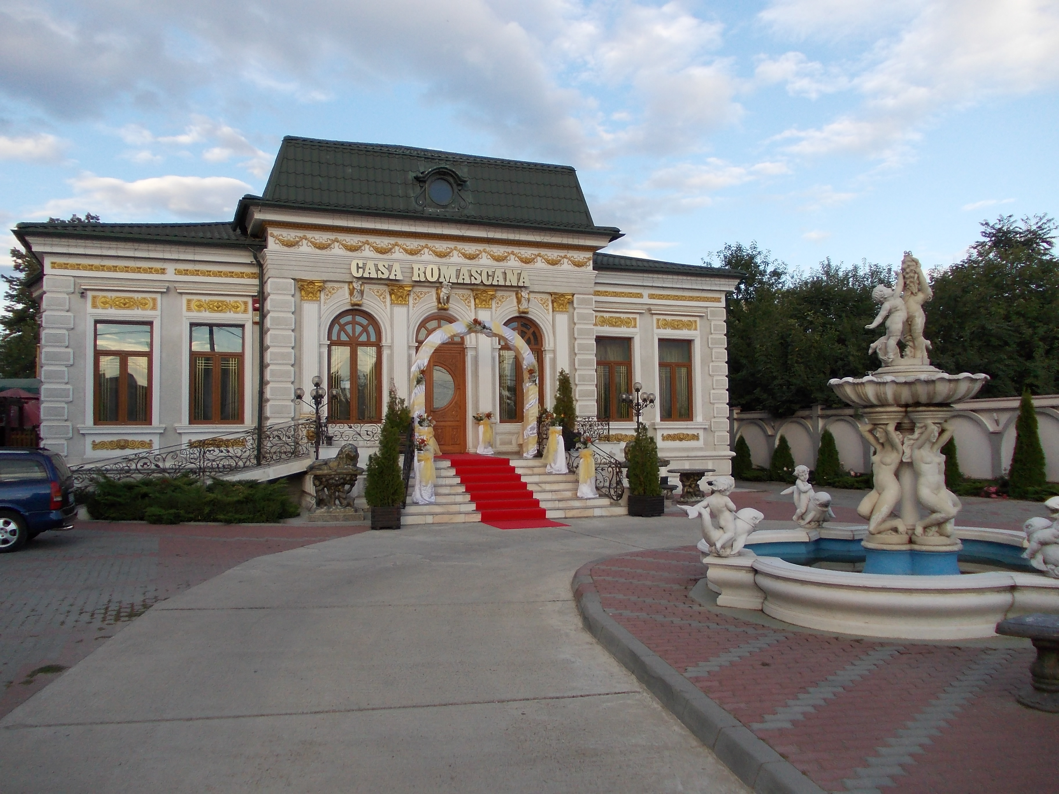 Casa Romașcană, azi restaurant